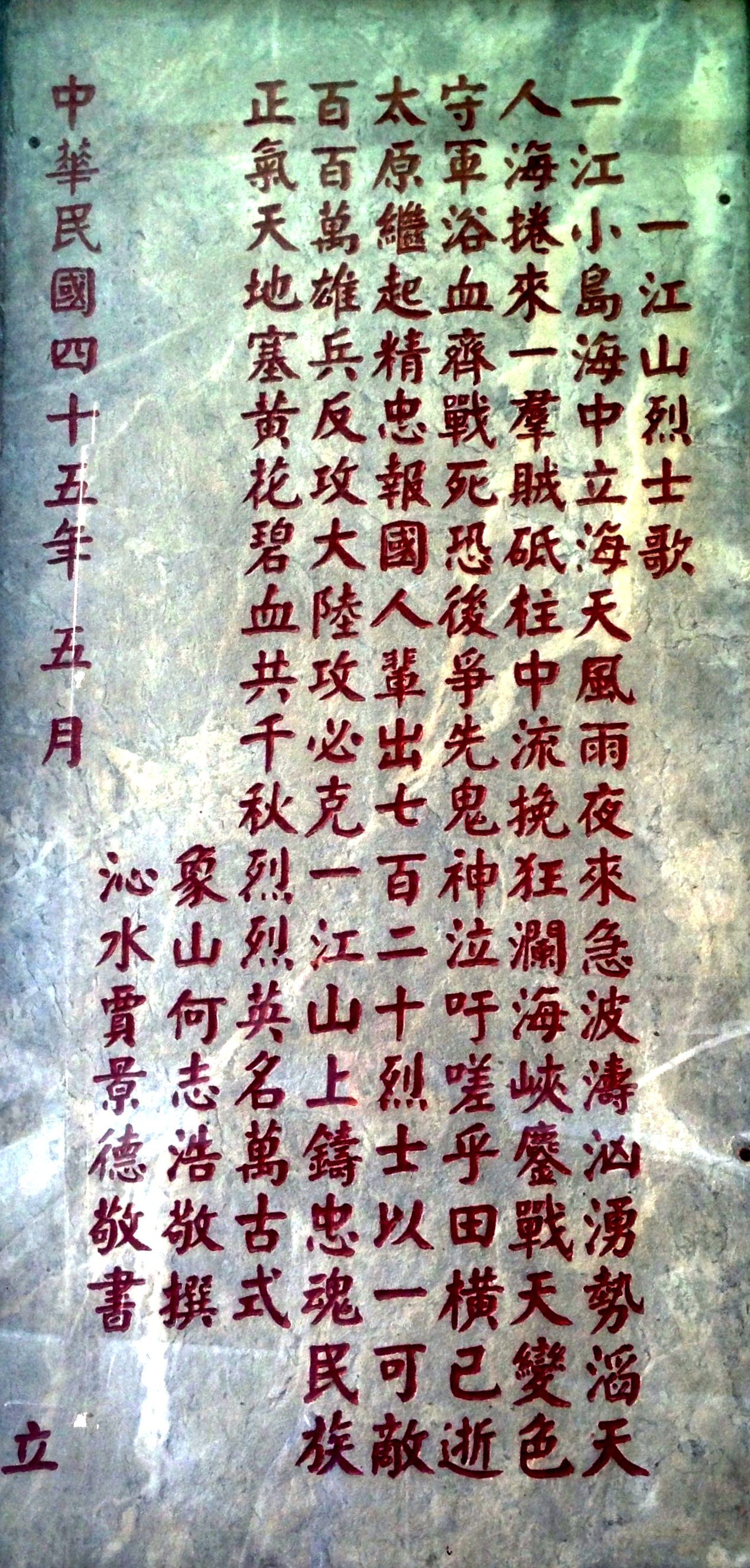 新北市中和區一江新城，何志浩創作、賈景德書寫的〈一江山烈士歌〉石碑，中華民國45年5月立。